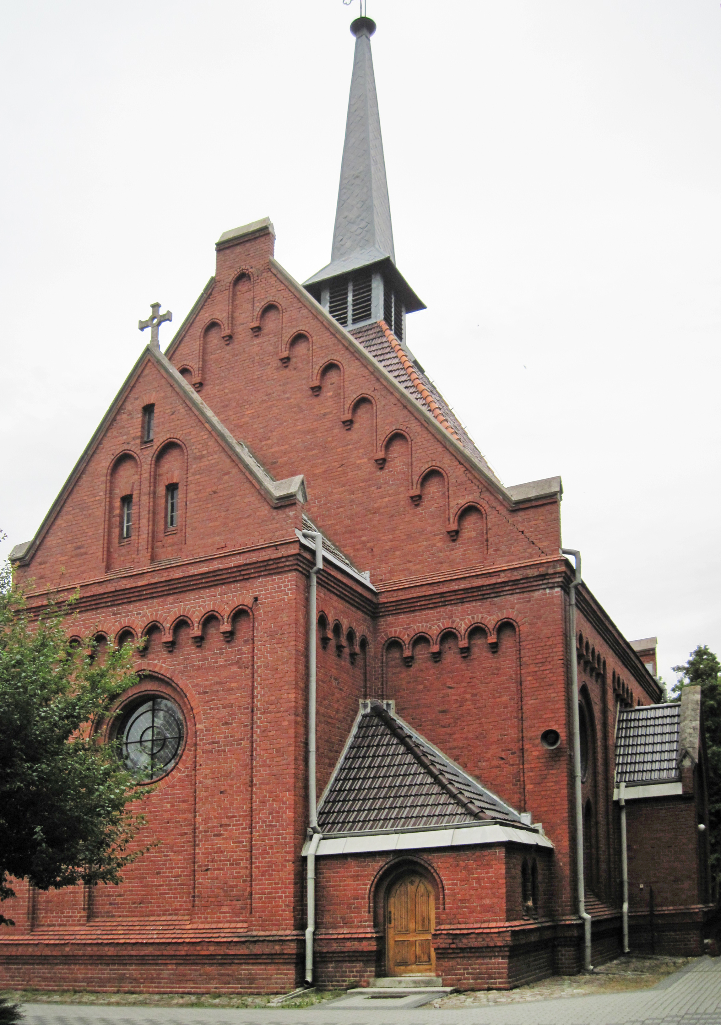 Kościół bł. Michała Kozala w Gnieźnie